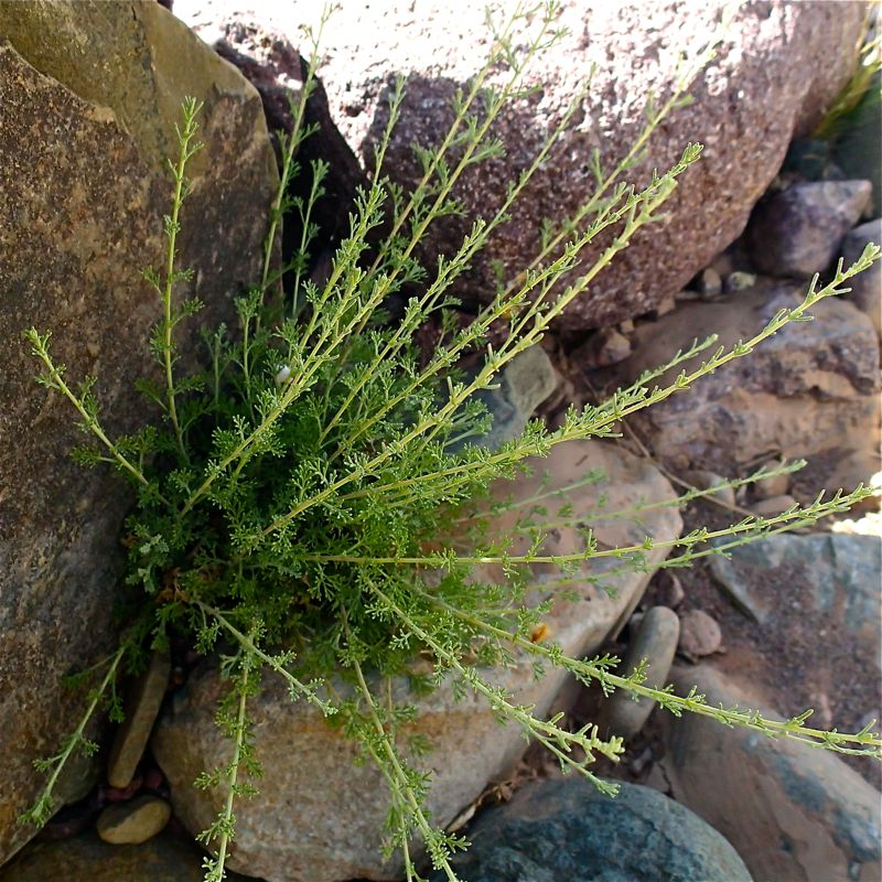 Present in Spain in the Middle East, North Africa to Egypt, Artemisia white grass is the most common herb in Morocco. As Absinthe (Artemisia absinthium) and Roman wormwood (Artemisia pontica), Artemisia white grass is rich in thujone. Morocco is the only producer of its essential oil, which it exports about 30 tons each year.